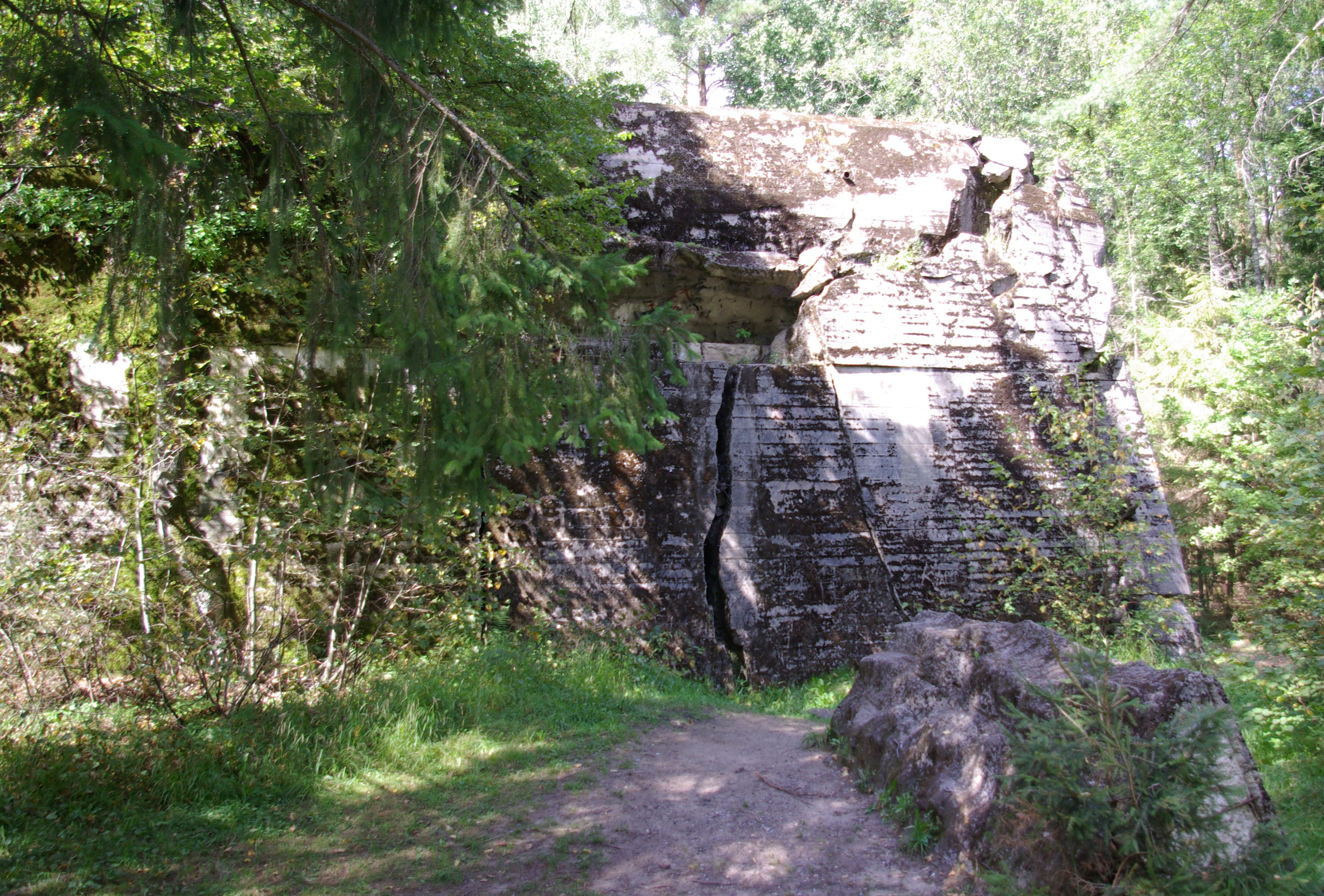 Kwatera Himmlera Hochwald